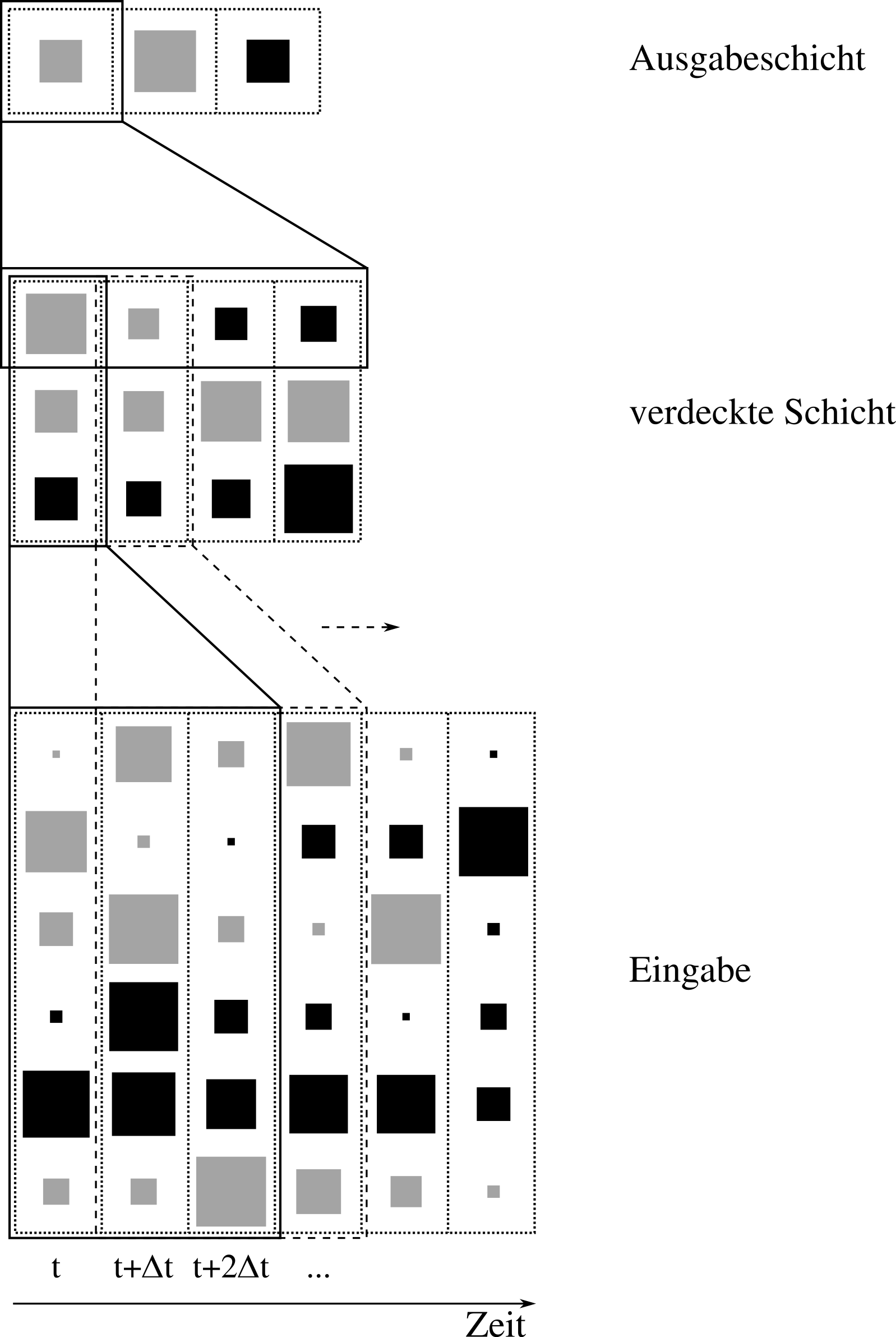 Schema eines Time Delay Neural Networks (TDNN), einer Ausprägung eines künstlichen neuronalen Netzes, mit zwei Schichten.